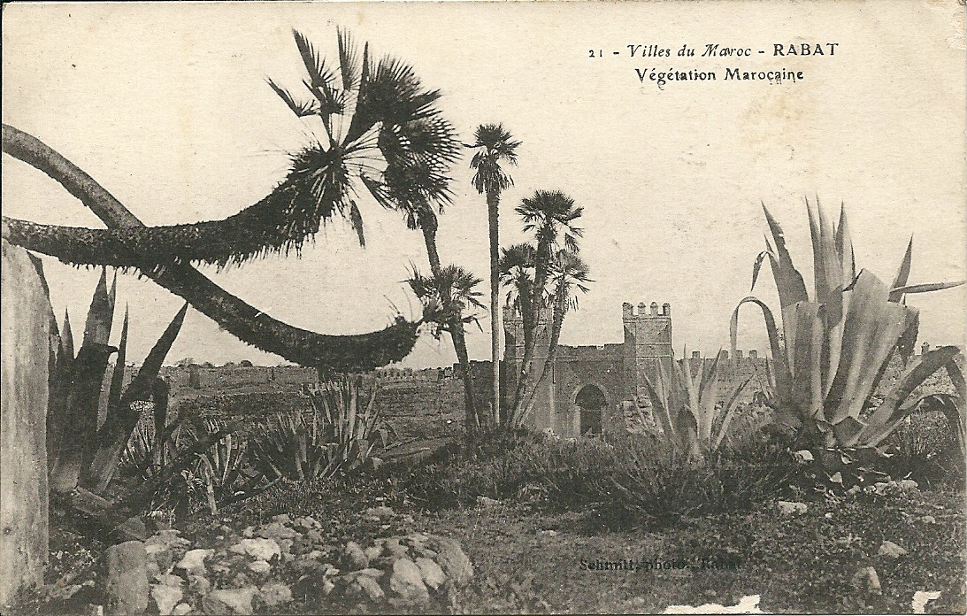 Végétation à l'entour de Rabat (Maroc) vers 1919